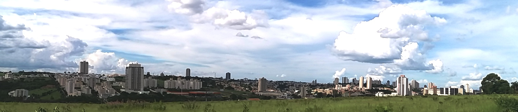 Vista parcial do Centro e da Zona Oeste a partir da alça de acesso da Rodovia Cândido Portinari para a Rodovia Fábio Talarico (Sentido Barretos).